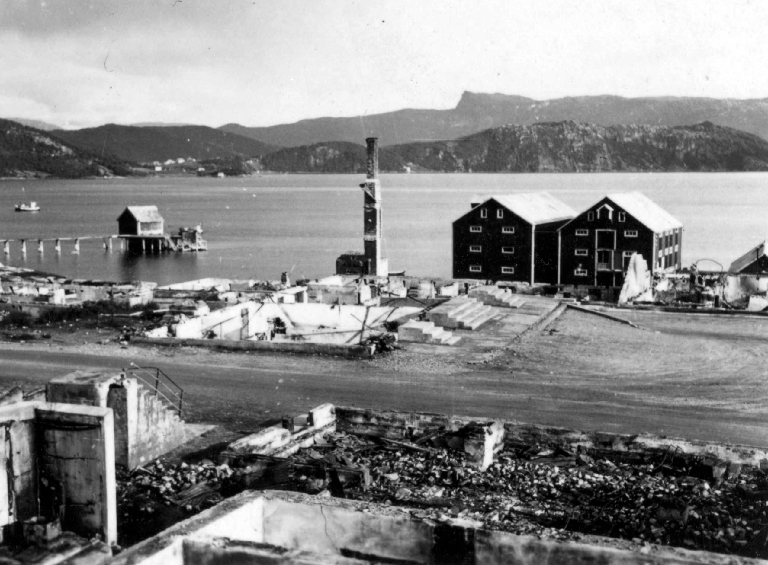 Ruiner, brygge ved Hemnesberget Tittel / Title: Hemnesberget sommeren 1940 Dato / Date: 1940 Fotograf / Photographer: Karl Marth Sted / Place: Hemnesberget, Nordland, Norge Eier / Owner Institution: Arkiv i Nordland Lenke / Link: Arkiv i Nordland Arkivreferanse /Archive reference: AIN.NA143.0181 Fra Dag Skogheims Privatarkiv